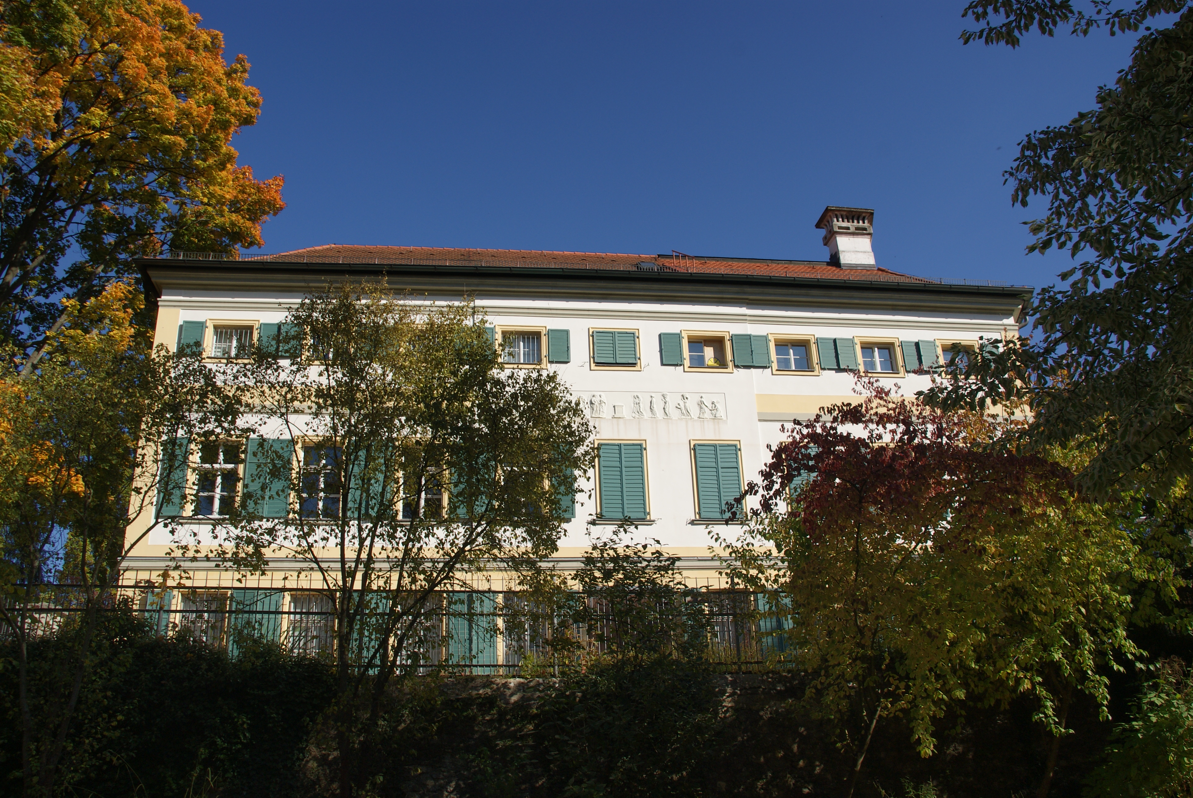 Naturkundemuseum, ehem. Württembergisches Palais